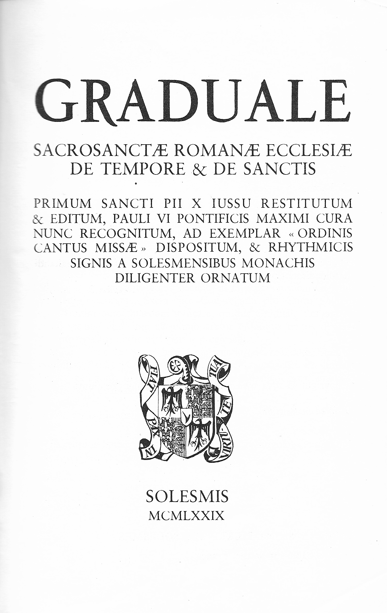 Graduale Romanum (Auflage 1979 der Ausgabe von 1974)